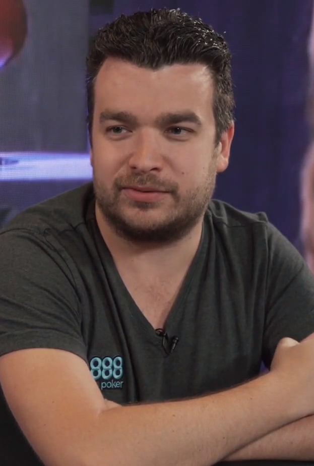 Chris Moorman analysiert eine Pokerhand